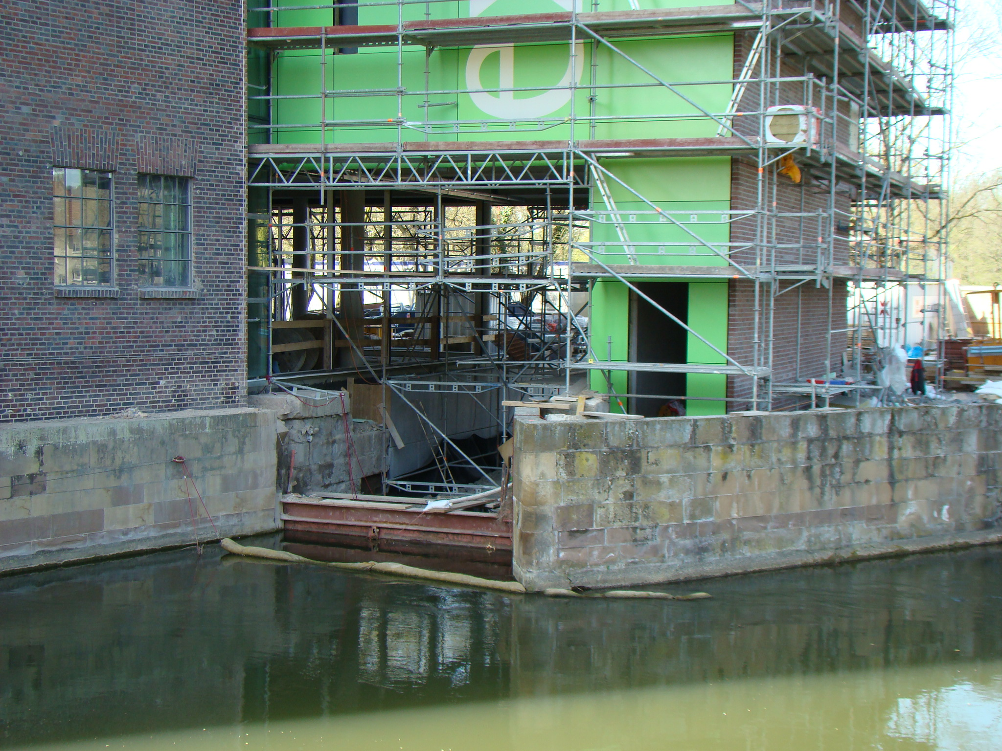 Hagenbucher in Heilbronn, alter Triebwerkskanal